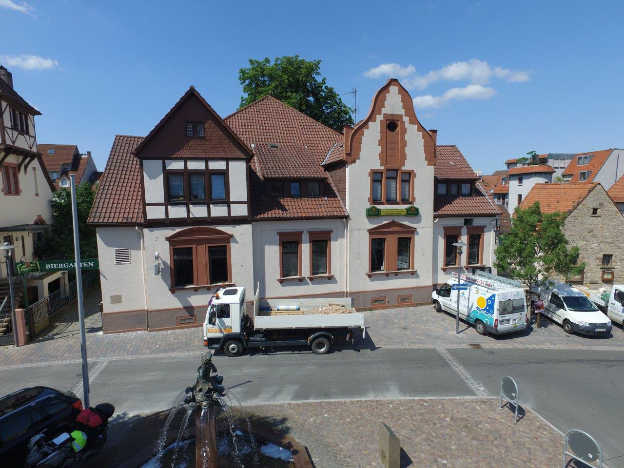 Gossini Restaurant Heppenheim